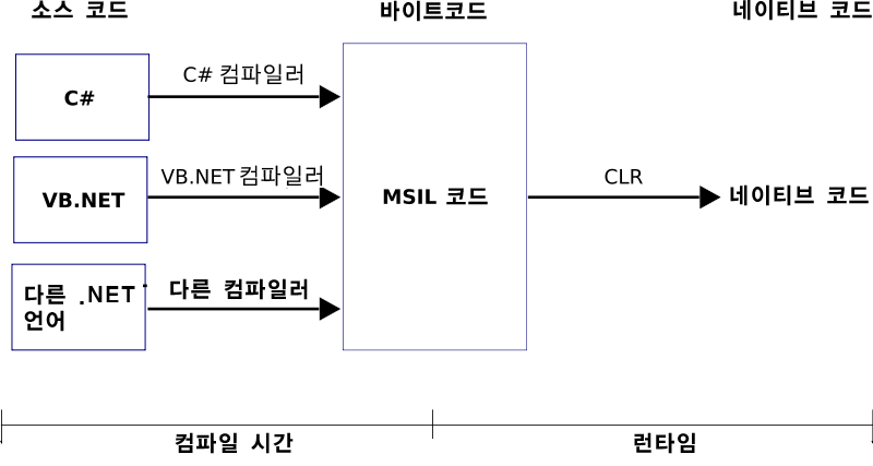 공통 언어 런타임 다이어그램을 한국어로 표기합니다.